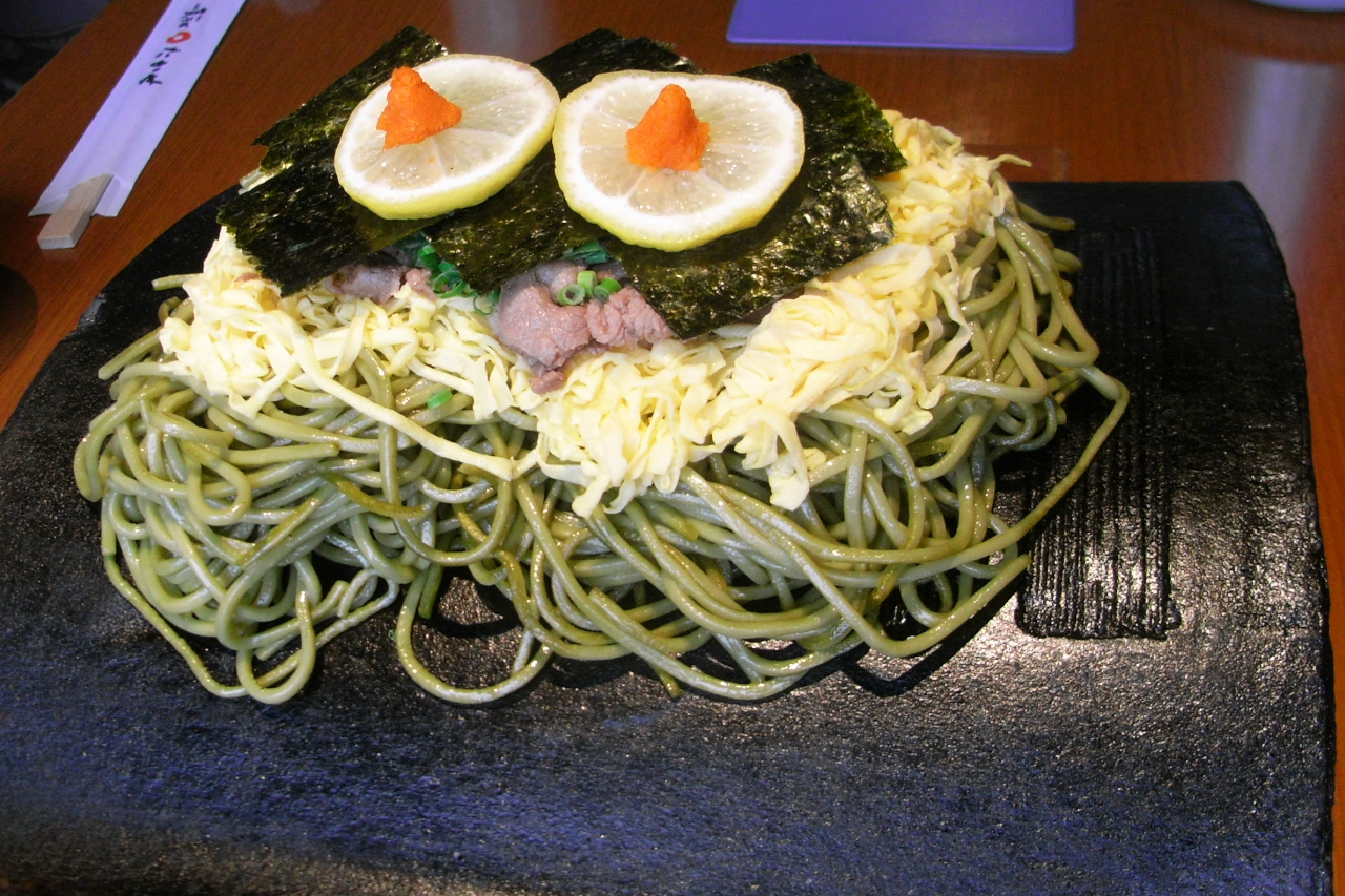 川棚温泉名物瓦そば。門司港にある支店にて。